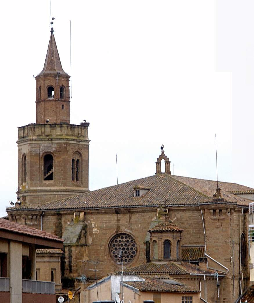 Barbastro Cathedral